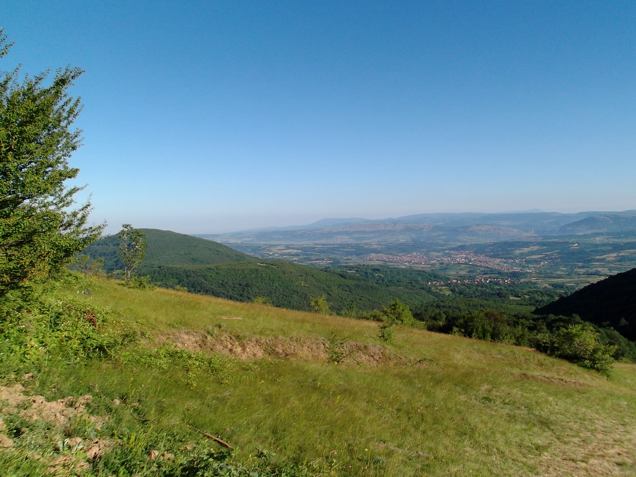 Svrljig